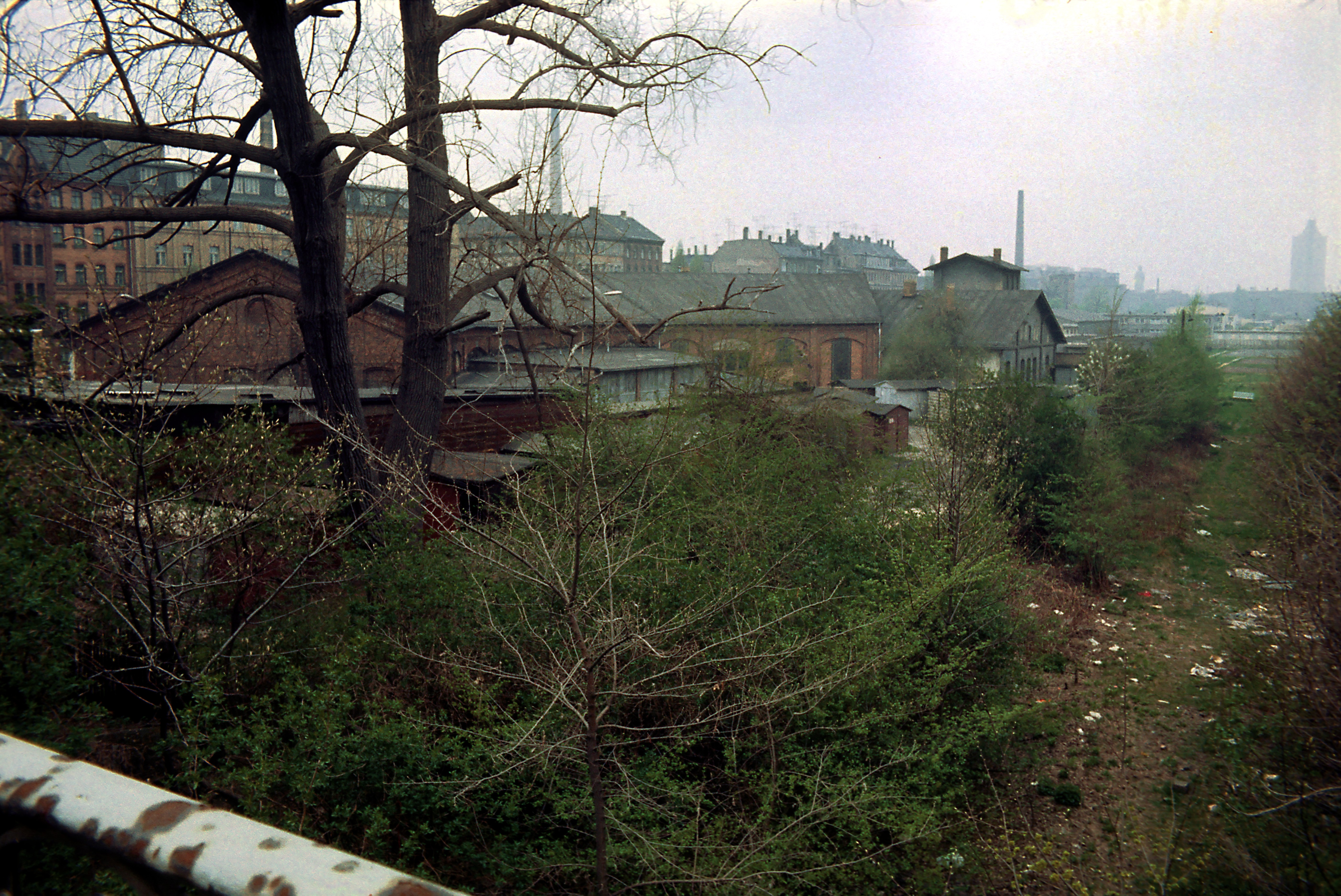 Das Rundhaus ist auch 2015 noch erhalten. Von der Brücke Riebeckstraße, Richtung Westen